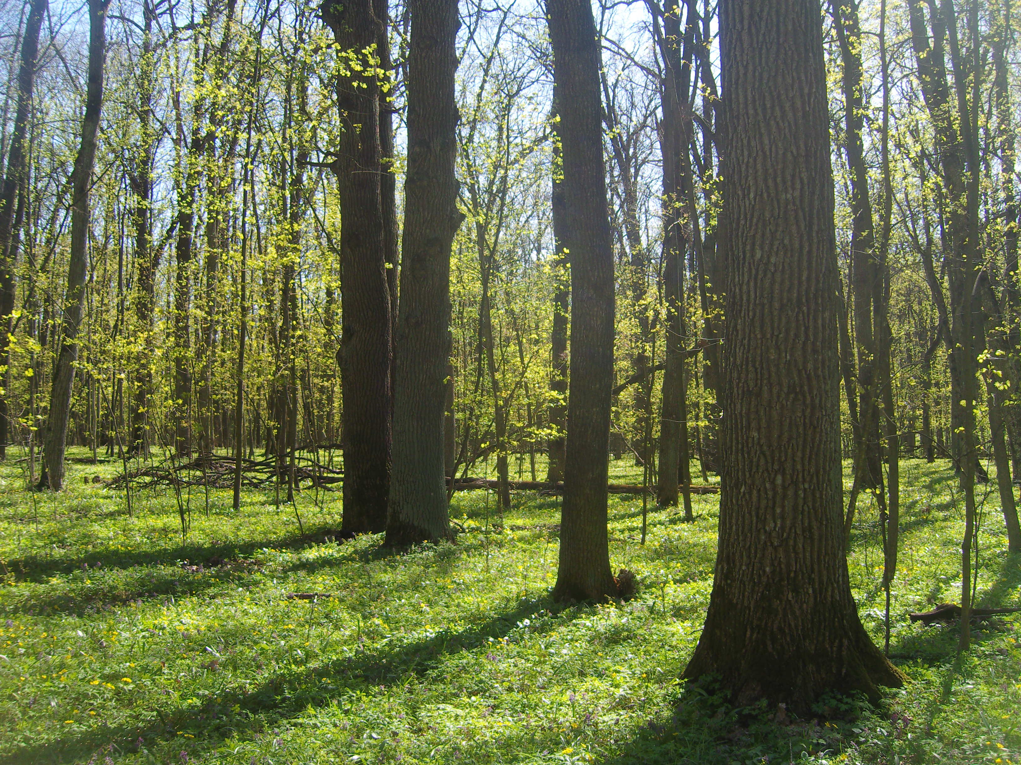 «Лес на Ворскле», участок заповедника «Белогорье». Белгорордская область.